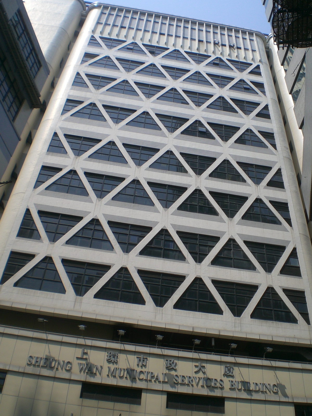 上環市政大廈